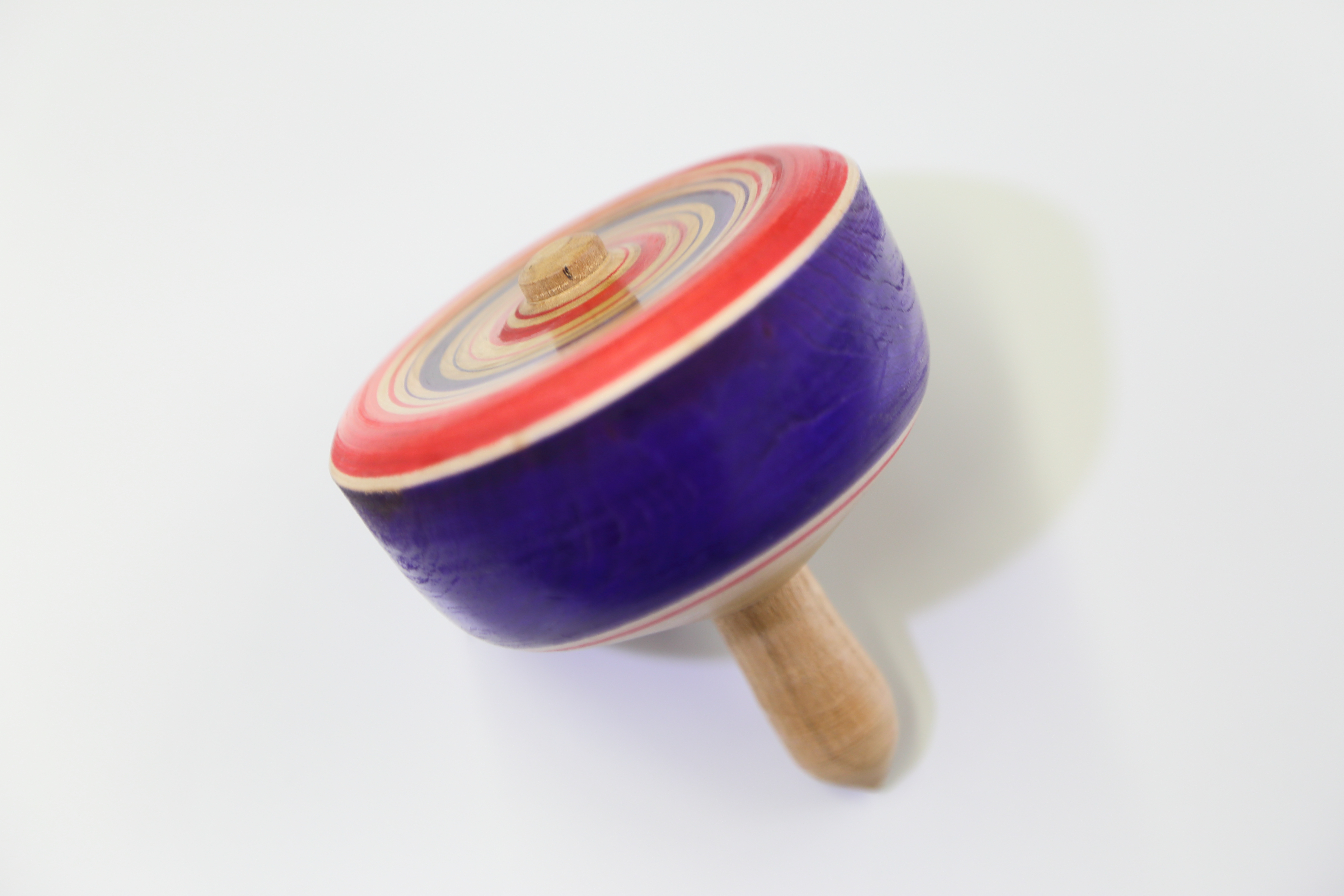 伊勢原市の伝統工芸品である「大山こま」。